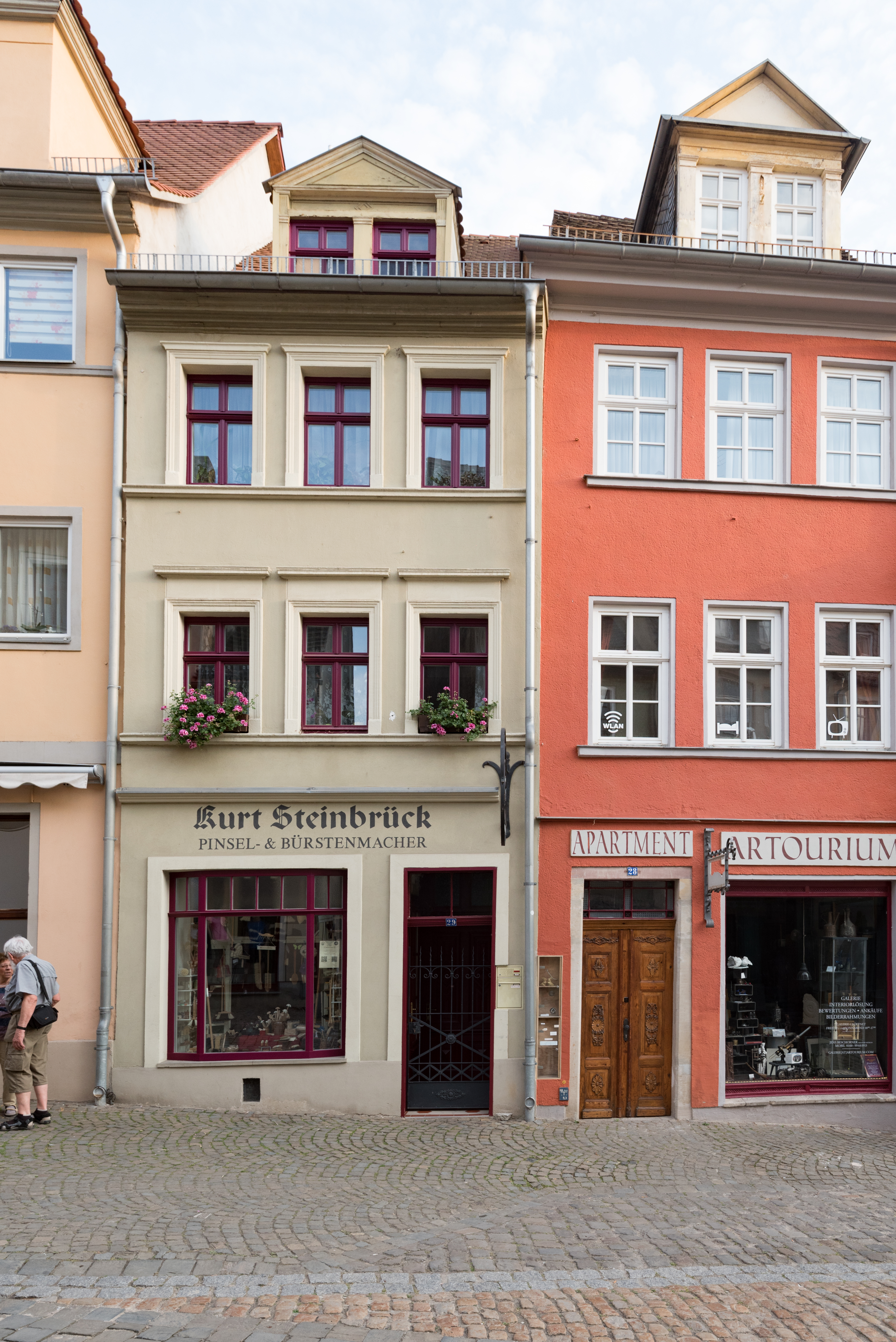 Naumburg (Saale), Steinweg 29